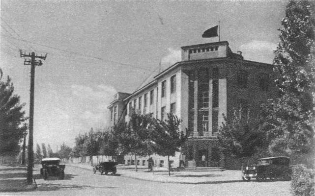 Imagine din oraşul Tiraspol